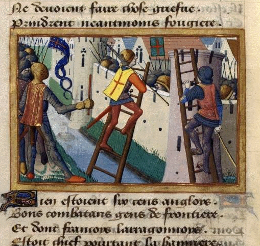 François de Surienne et ses hommes s'emparent de Fougères, par Martial d'Auvergne, enluminure issue de l'ouvrage Vigiles de Charles VII, Paris, France, XV°siècle.